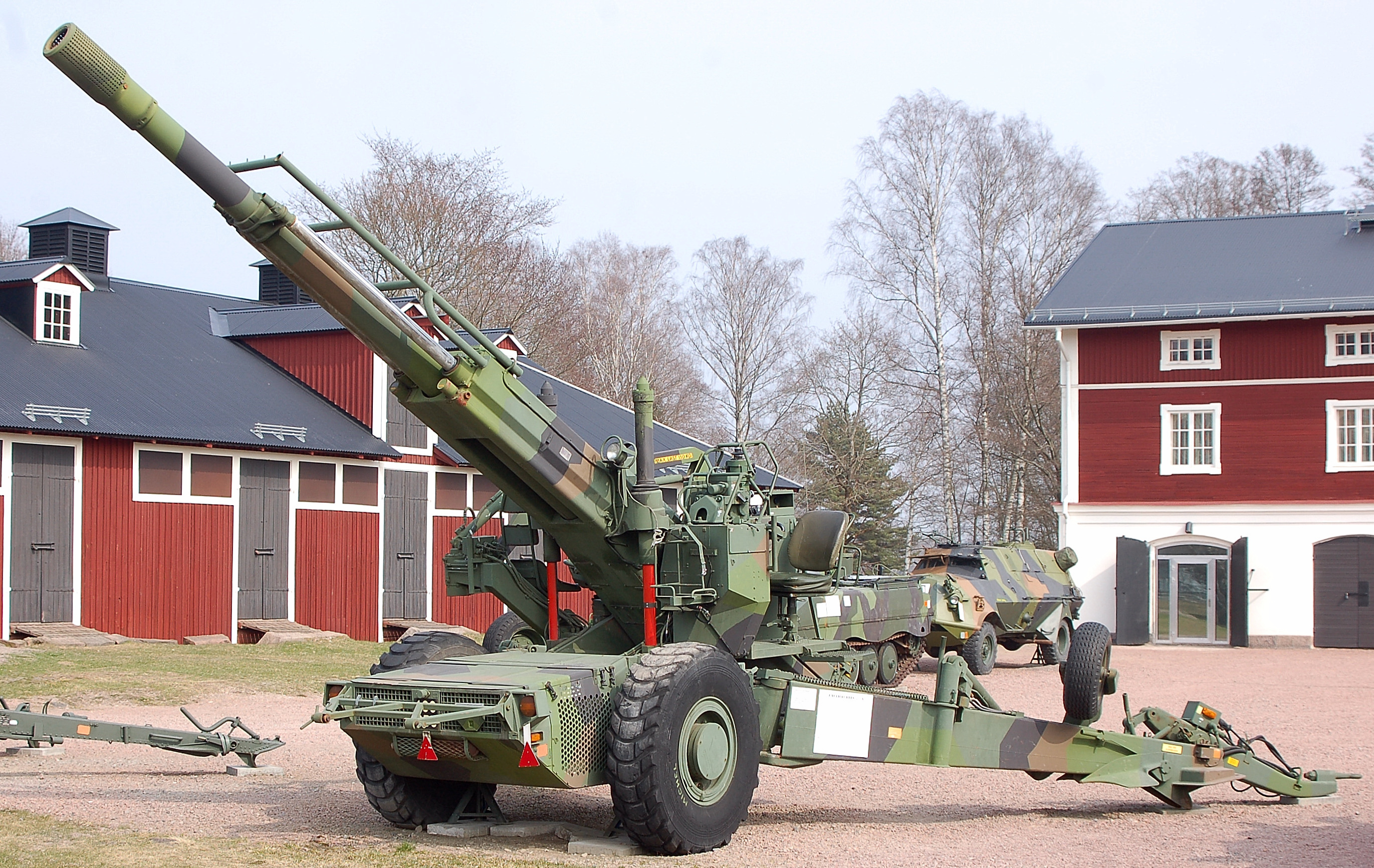 Fälthaubits 77 A statiskt utställd på Brigadmuseum i Karlstad.